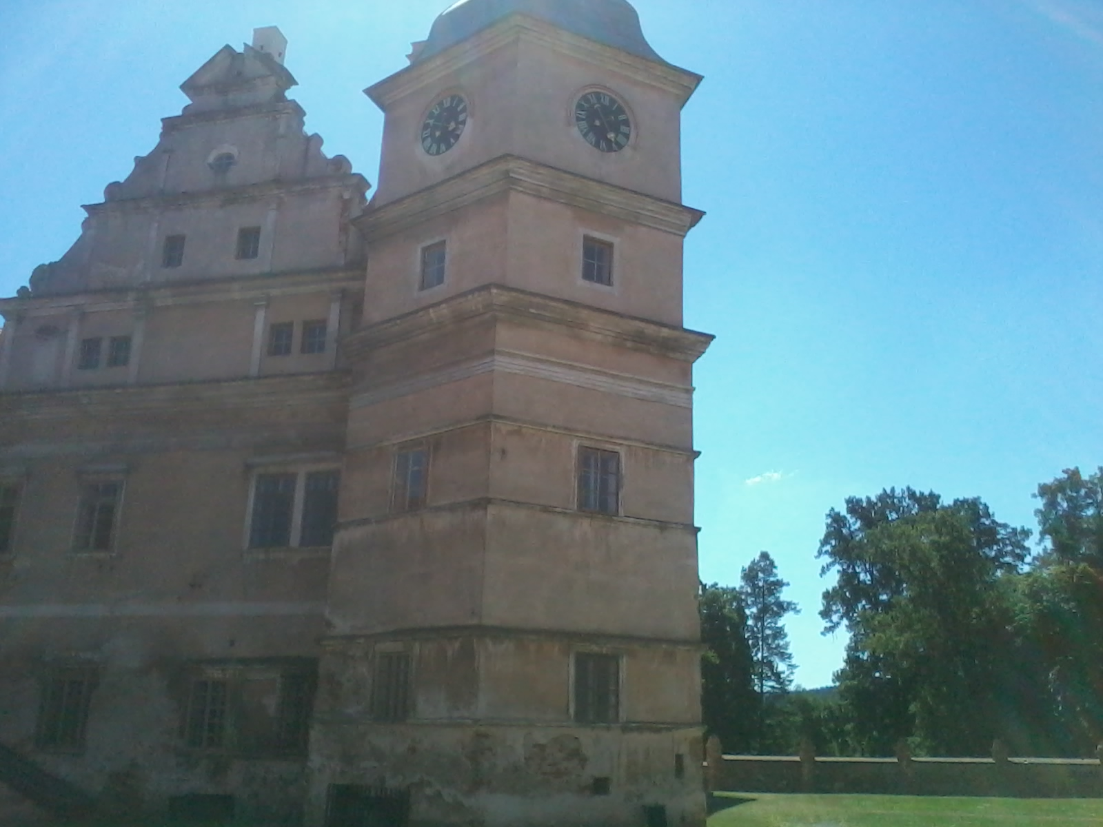 Zámecká věž